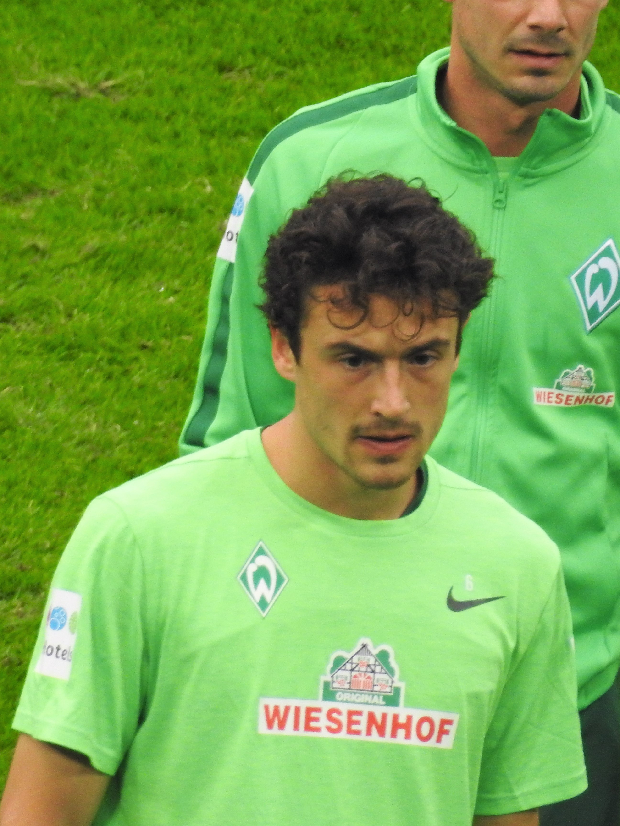 Thomas Delaney, Werder Bremen